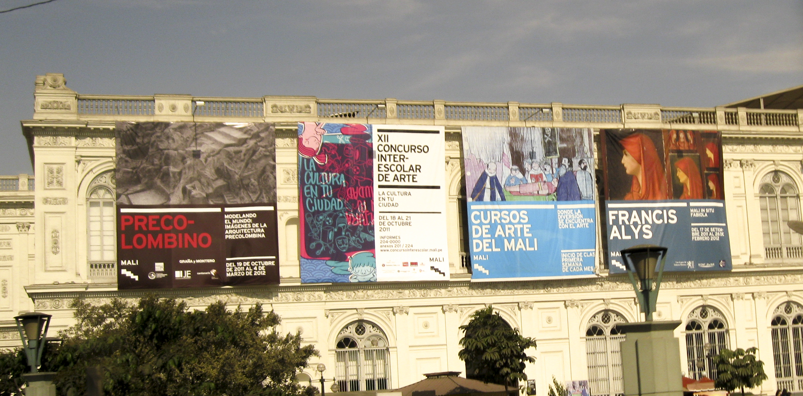 streets in Lima